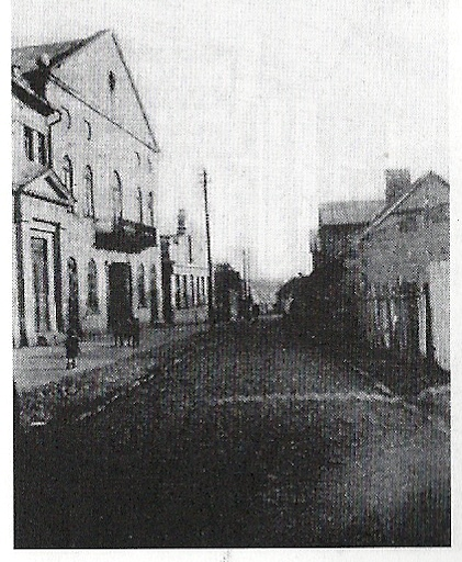 Mława nieistniejąca obecnie w planie miasta ulica Kozia i znajdująca się przy niej przed 1939 synagogą